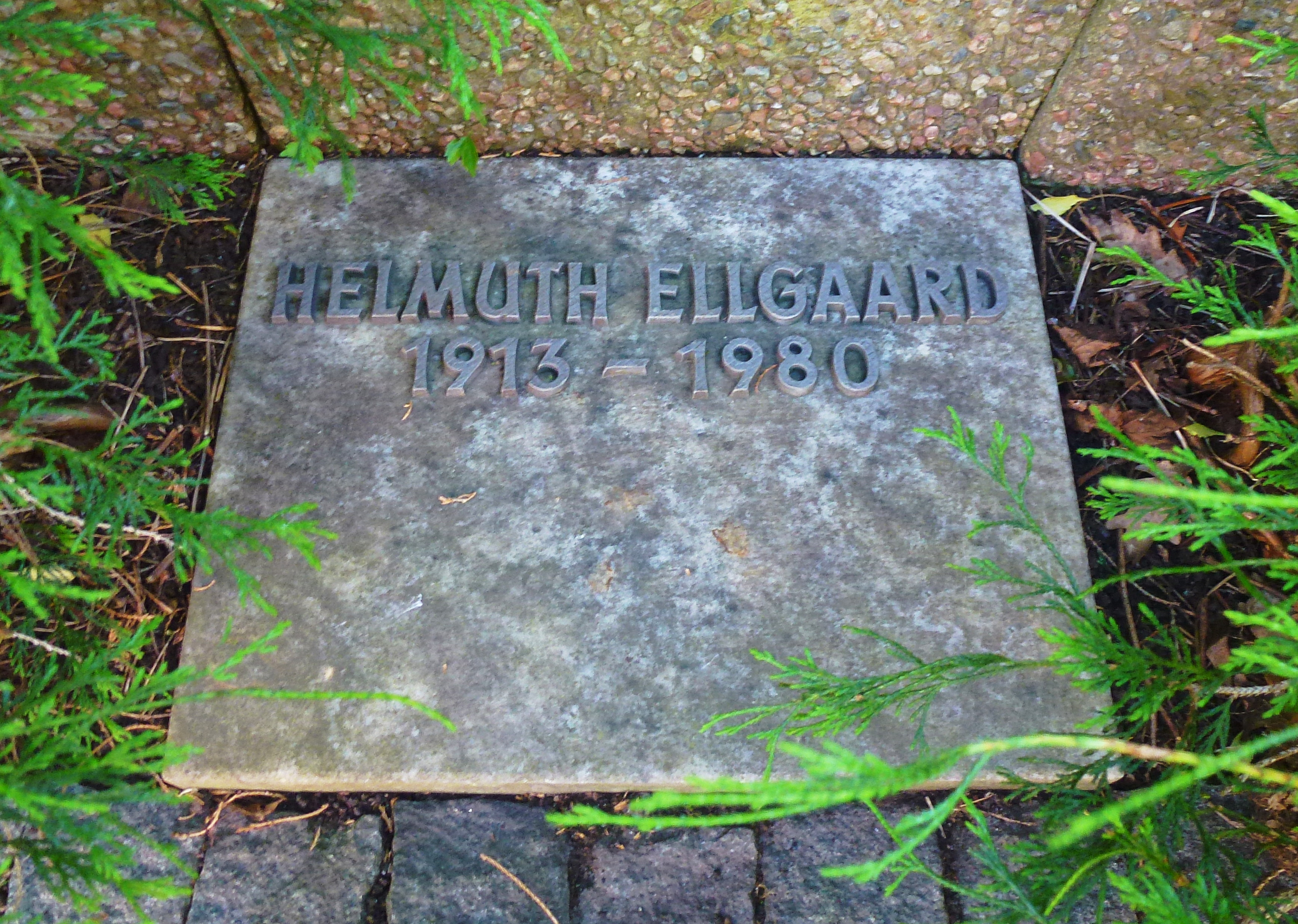 Grabstein Helmuth Ellgaard 1913-1980